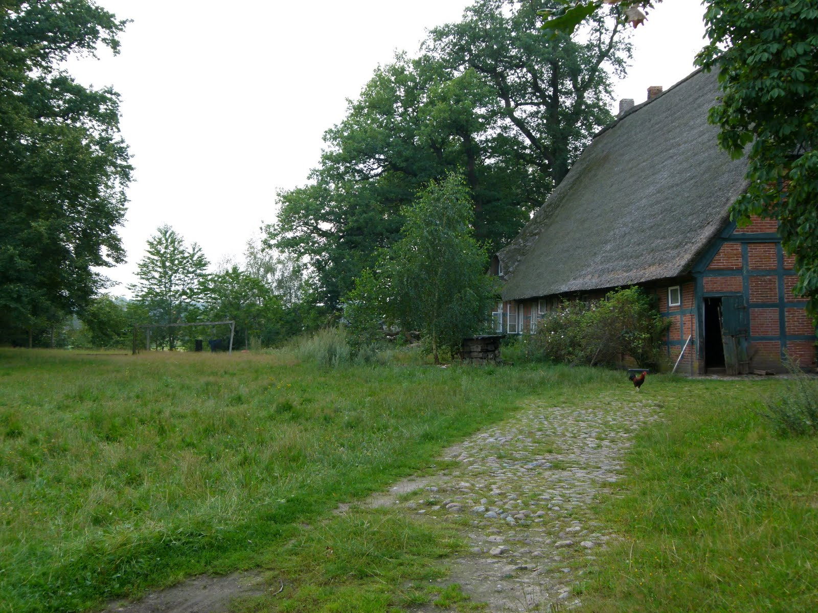 Cour de ferme à Willenscharen